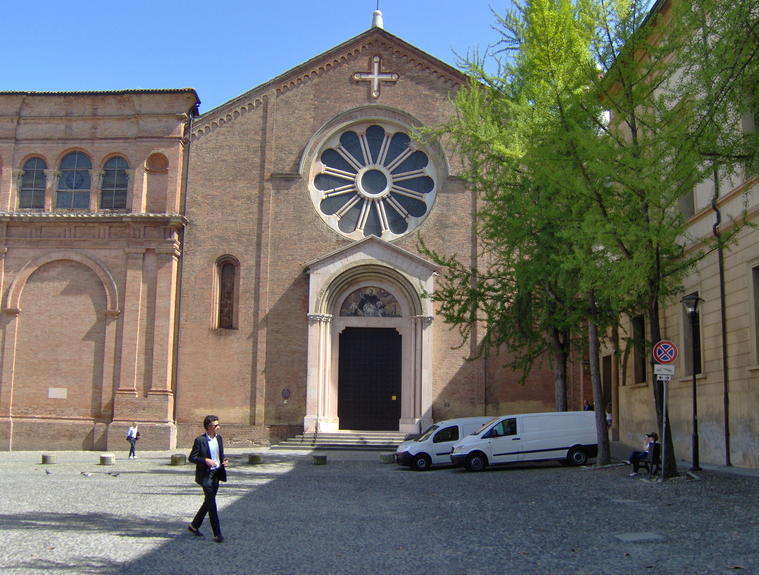 Basilica San Domenico - MIBAC This is a photo of a monument which is part of cultural heritage of Italy.